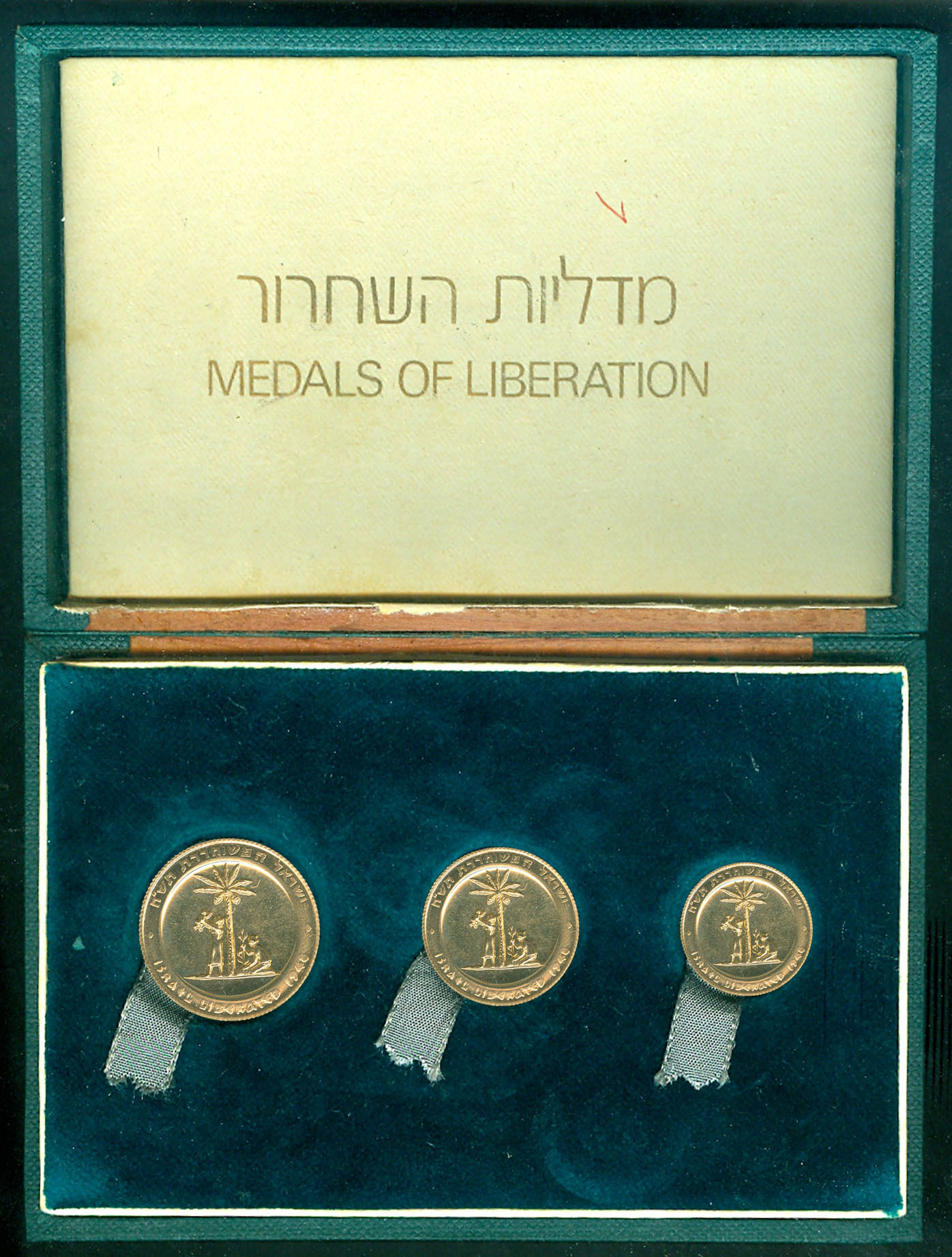 מדליית שחרור דור ג' סט 3 מדליות זהב